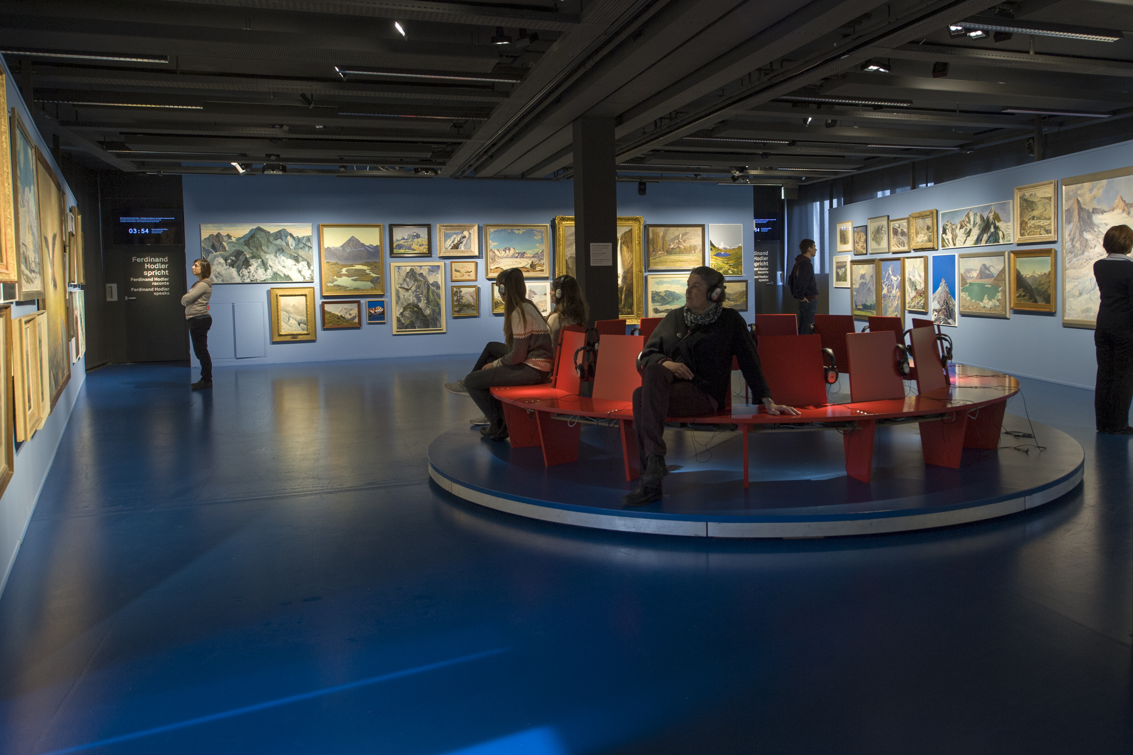 Auf dem Drehkarussell durch die Bergwelt der Hauptausstellung «Schöne Berge. Eine Ansichtssache» (bis 1. September 2019)